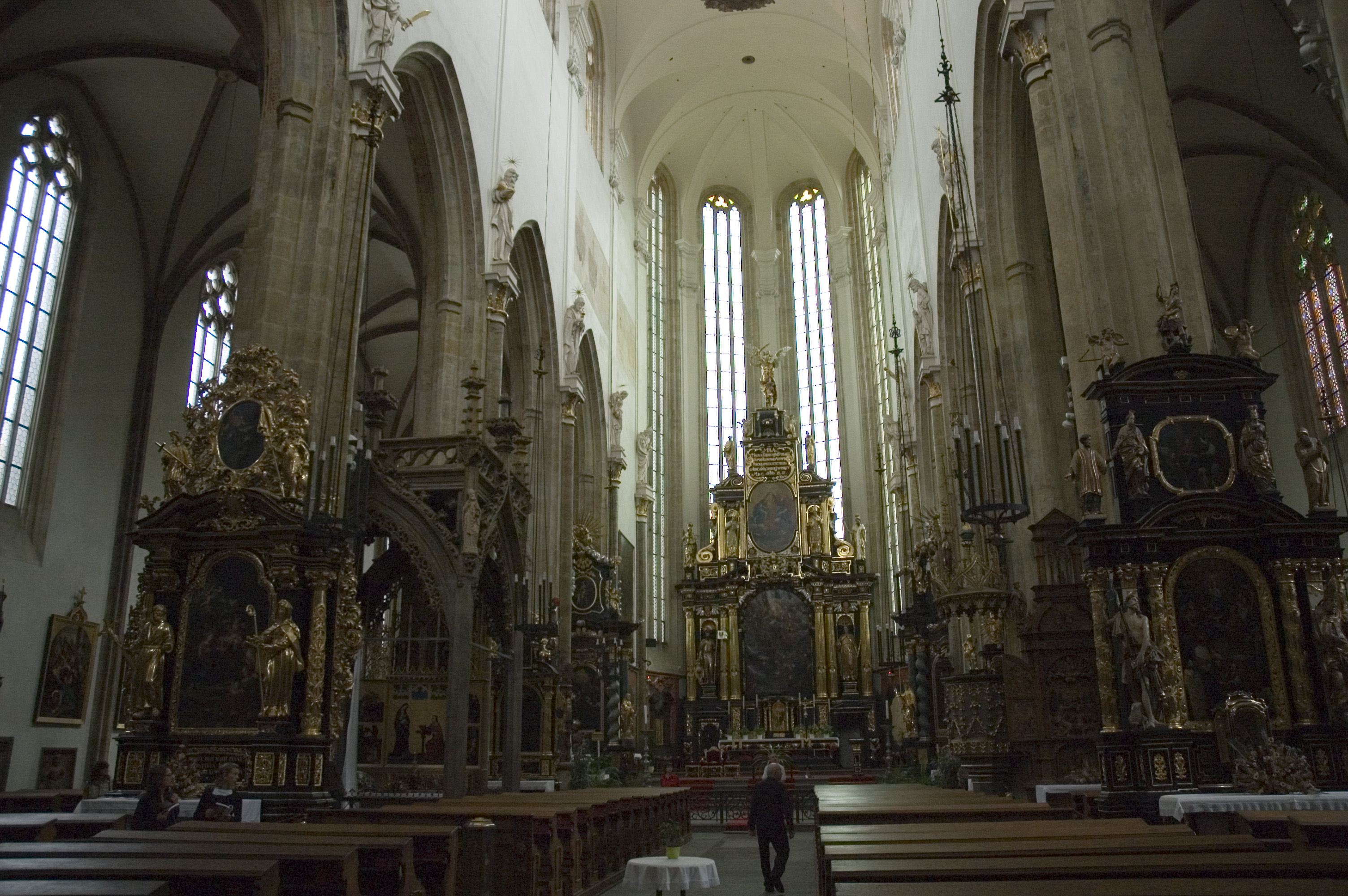 Praha, Týnský chrám